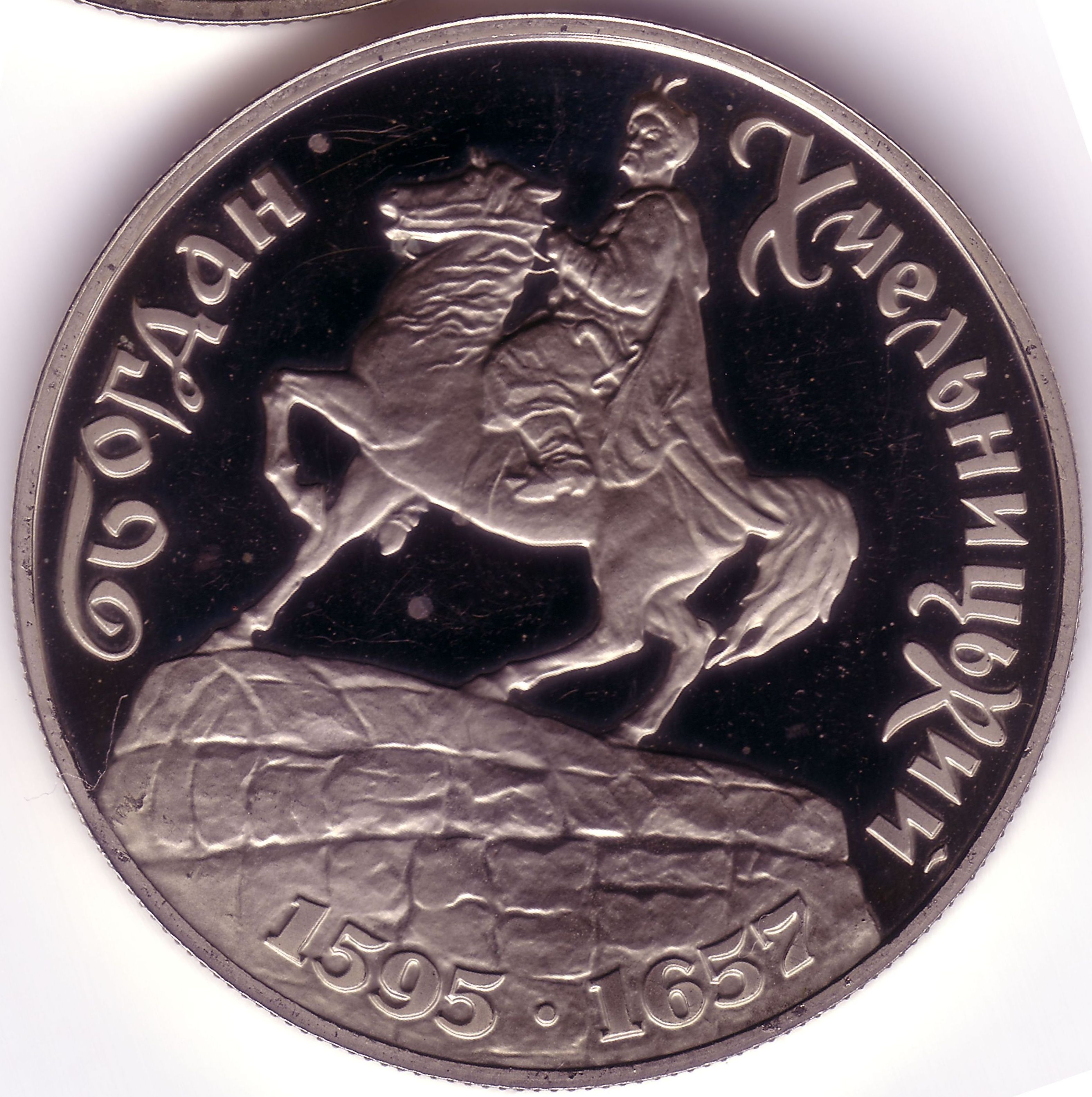 Ukrainian Coin Богдан Хмельницкий Revers 1995, 1996 Характеристики монет Номинал: 200000 карбованцев Тираж: 250000 шт. Материал: медно-никелевый сплав Качество: пруф-лайк Диаметр: 33,00 мм. Вес: 14,35 гр. Гурт: рифленый Номинал: 1000000 карбованцев Тираж: 10000 шт. Материал: серебро 925 Качество: пруф Диаметр: 33,00 мм. Вес: 15,55 гр. Гурт: рифленый